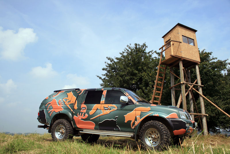 Geländewagen mit Car Wrapping